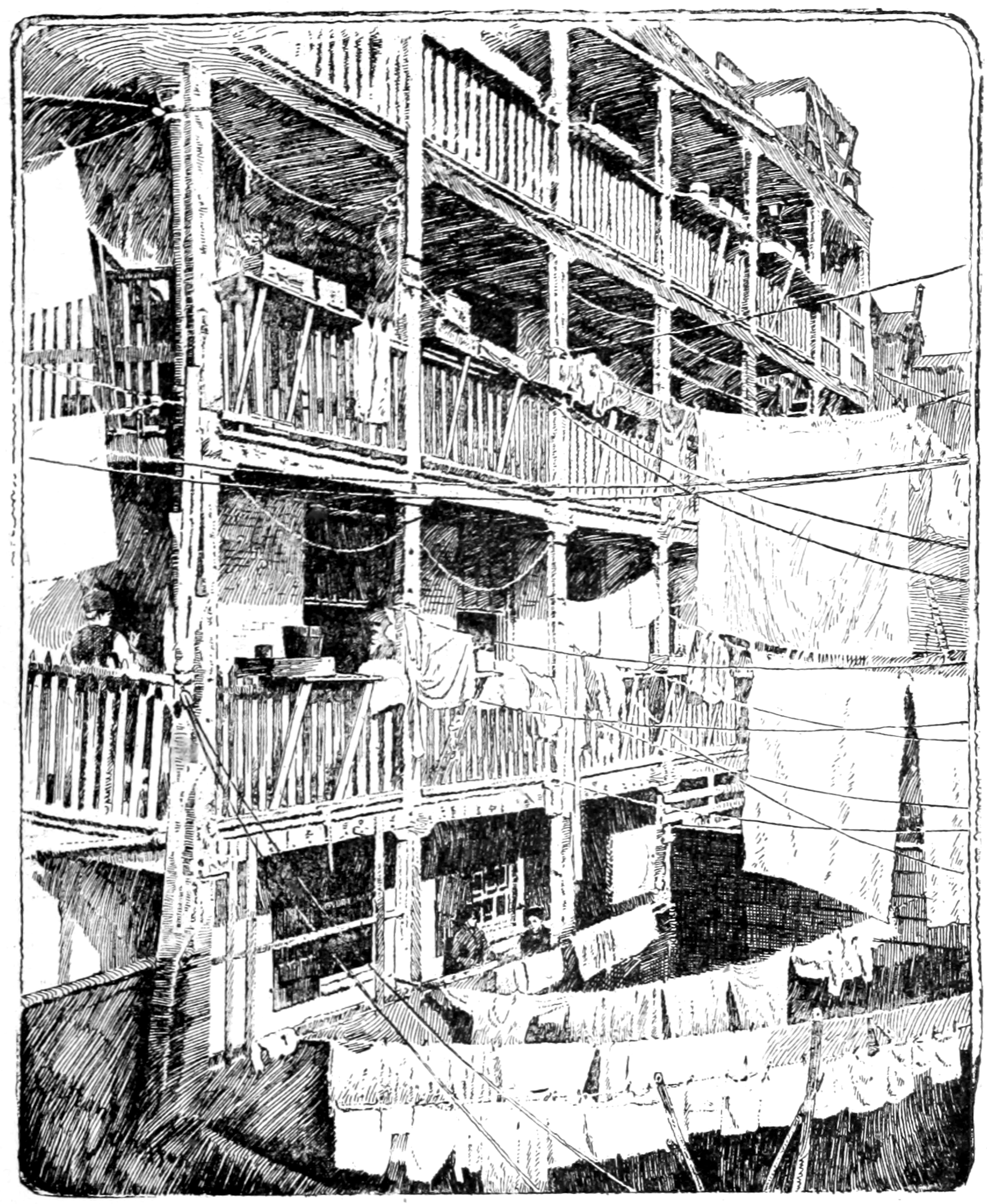 An Old Rear-Tenement in Roosevelt Street